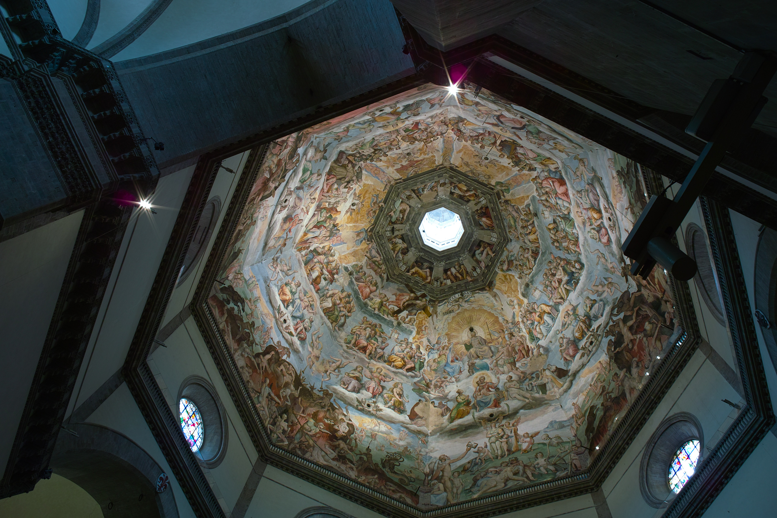 Coupole du Duomo, Santa Maria del Fiore, Florence